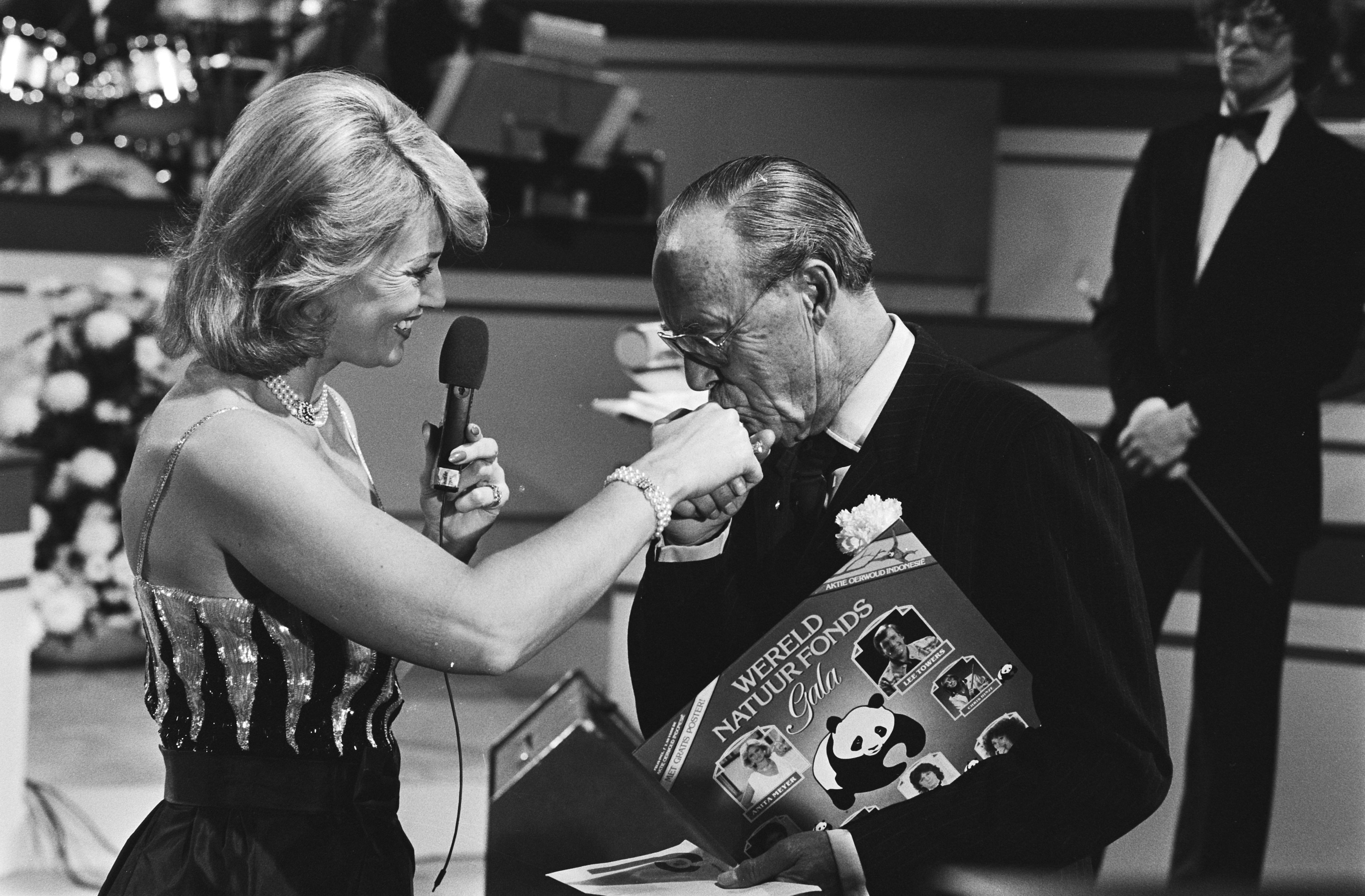 Collectie / Archief : Fotocollectie Anefo Reportage / Serie : Prinses Juliana en prins Bernhard zijn aanwezig op het Bloemengala Rijnsburg 1982, dat in het teken staat van de actie "Oerwoud Indonesië" van het Wereld Natuurfonds Nederland Beschrijving : Prins Bernhard geeft Willie Dobbe een handkus Datum : 19 november 1982 Locatie : Rijnsburg, Zuid-Holland Trefwoorden : grammofoonplaten, kussen, natuurbeheer, prinsen, prinsessen, programmamakers Persoonsnaam : Bernhard, prins, Dobbe, Willie, Juliana, koningin Fotograaf : Antonisse, Marcel / Anefo Auteursrechthebbende : Nationaal Archief Materiaalsoort : Negatief (zwart/wit) Nummer archiefinventaris : bekijk toegang 2.24.01.05 Bestanddeelnummer : 932-4141